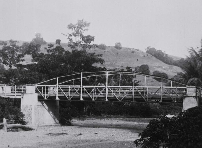 Foto. Brug bij Ganti